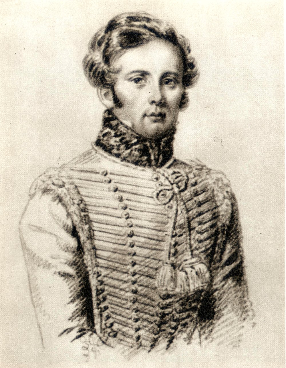 Jakob Essen Hamilton (1797-1864), överståthållare i Stockholm. Teckning av Maria Röhl 1834.